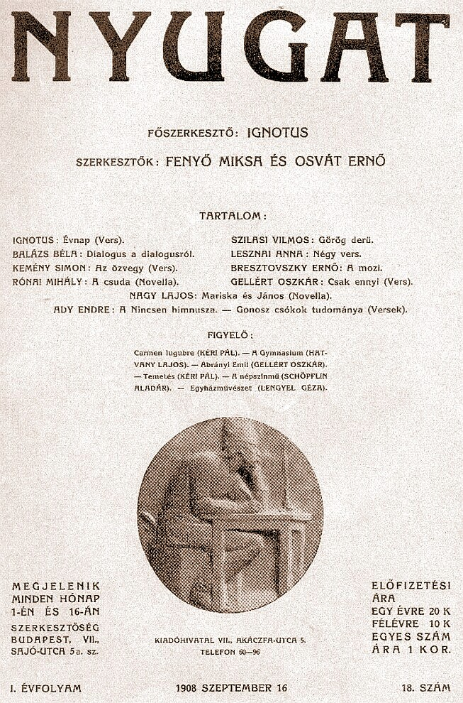 A Nyugat címlapja 1908-ból (18. szám)